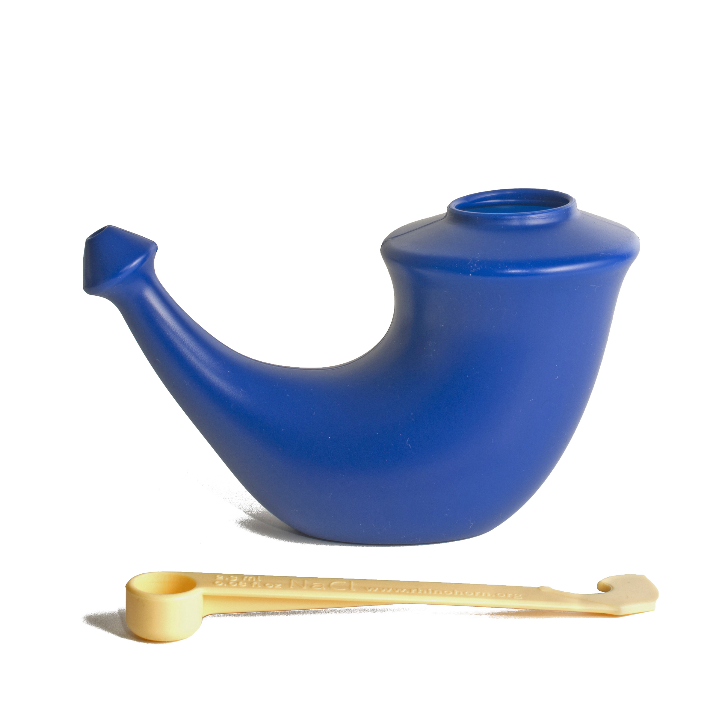 Jala neti / neti pot van Rhino Horn. Verkrijgbaar bij apotheek en drogist.